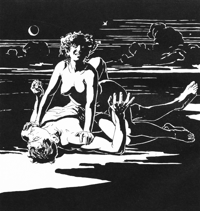 zuerst in Ver Sacrum, 1899, Heft 12, S. 8